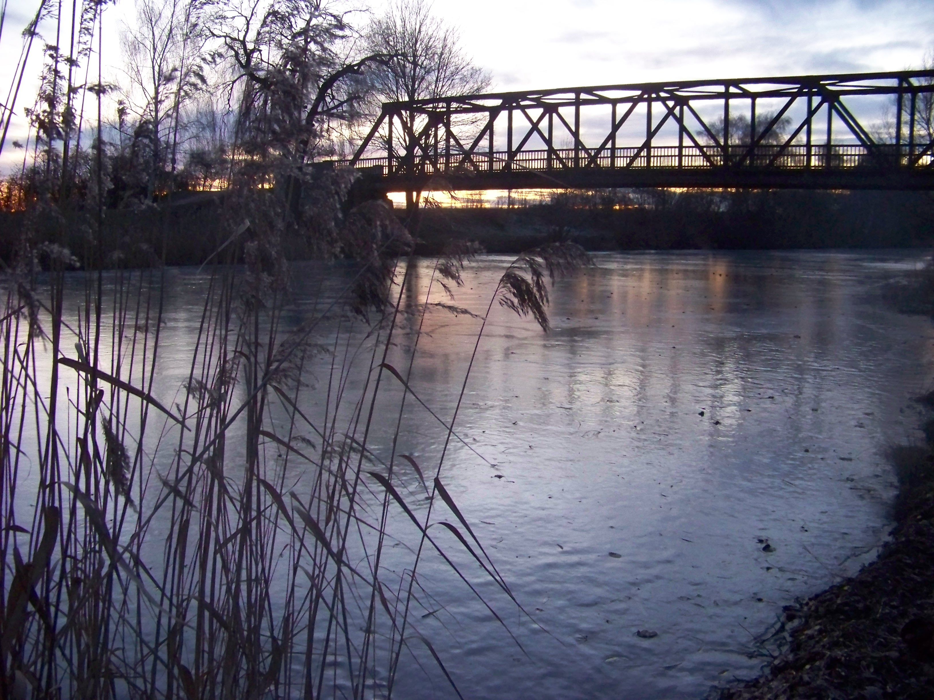 Kanalbrücke zwischen Burghausen und Dölzig